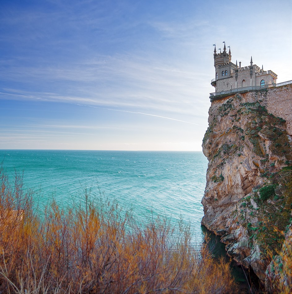 Мис Ай-Тодор, м. Ялта, сел. Гаспра